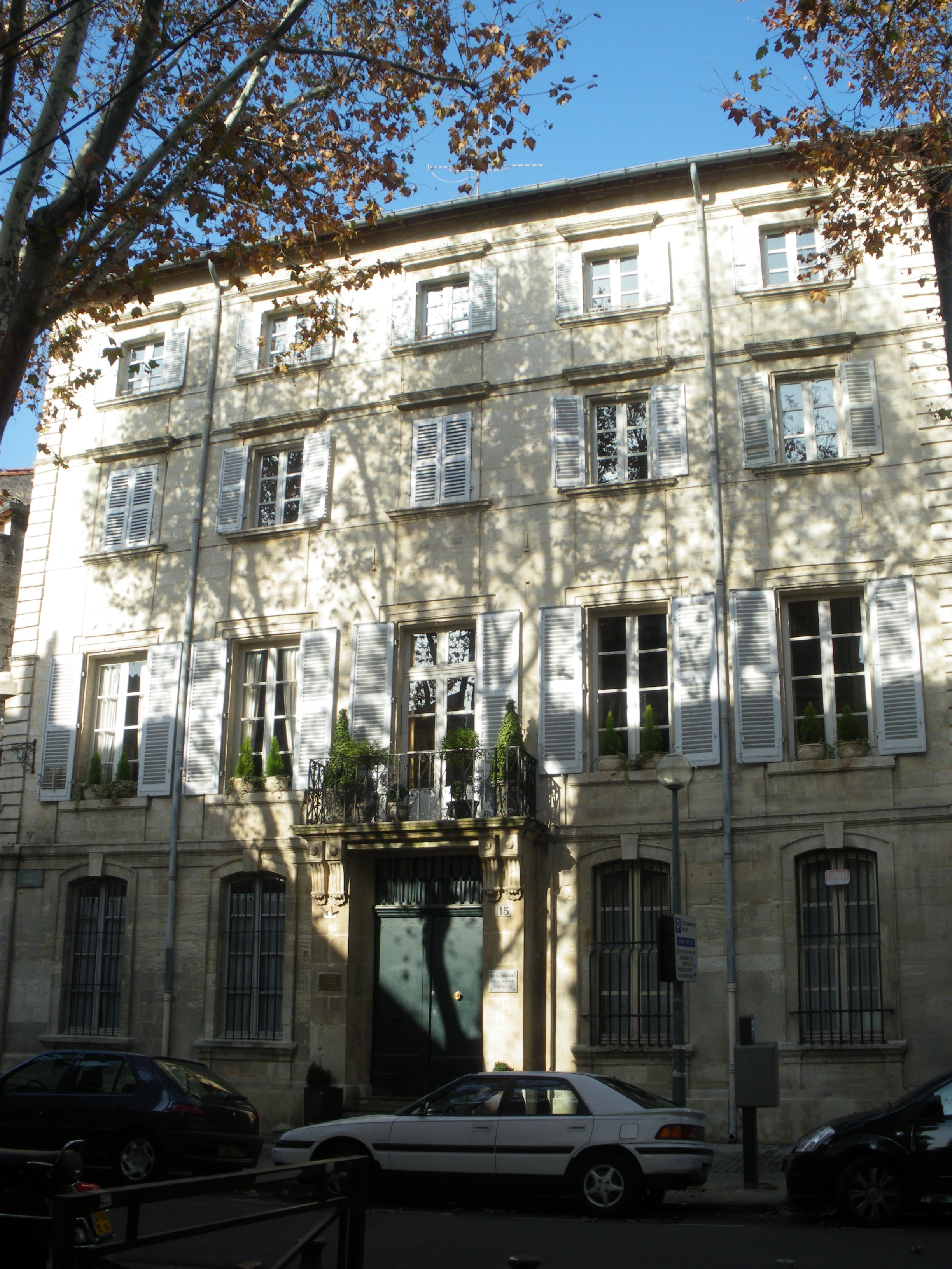 Hotel Achard de Baume, Avignon